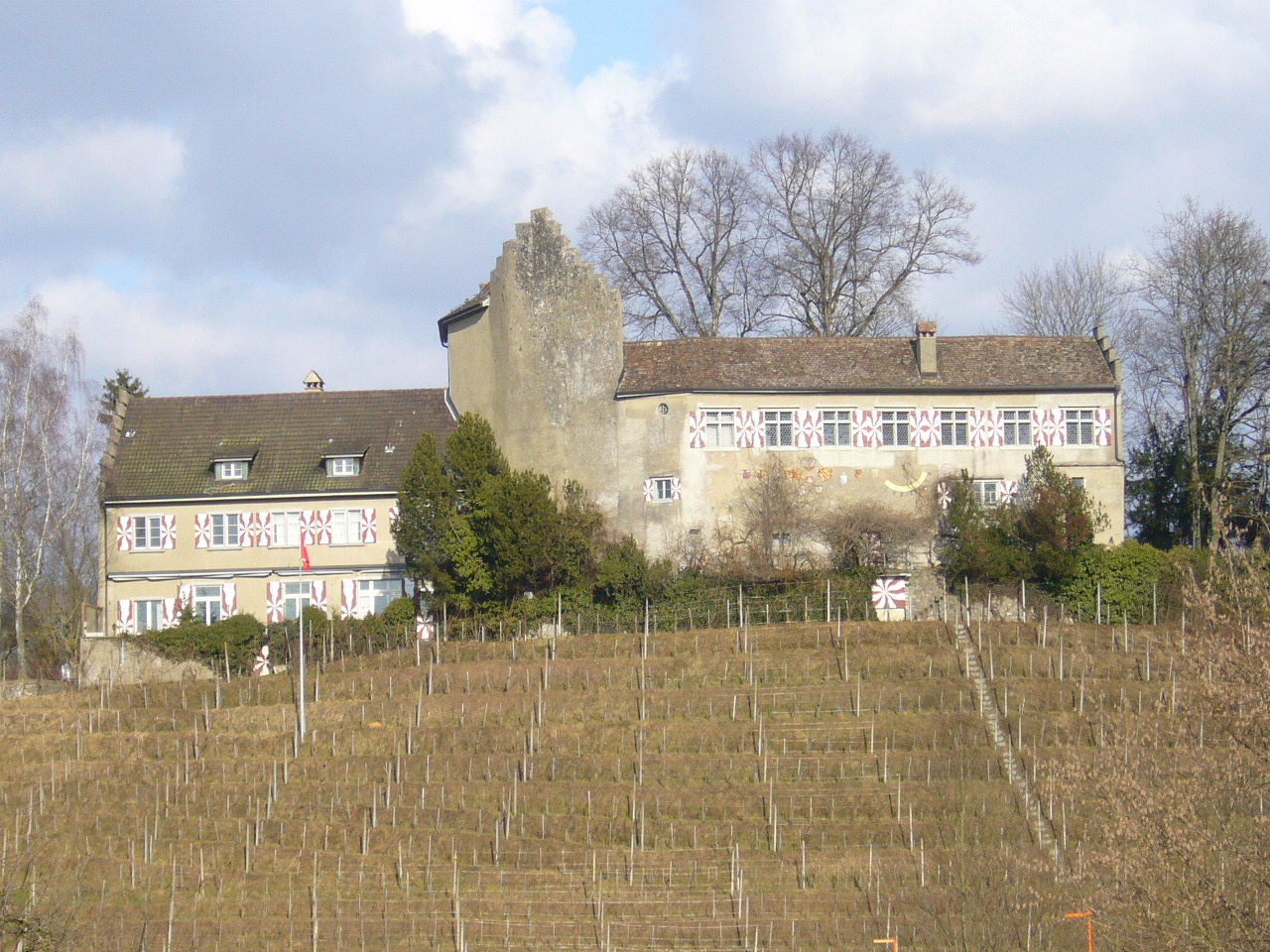 Waltalingen, Kanton Zürich, Schweiz: Schloss Schwandegg